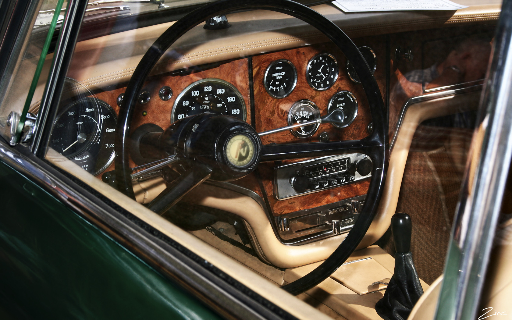 1963 Facel Vega III - green - int